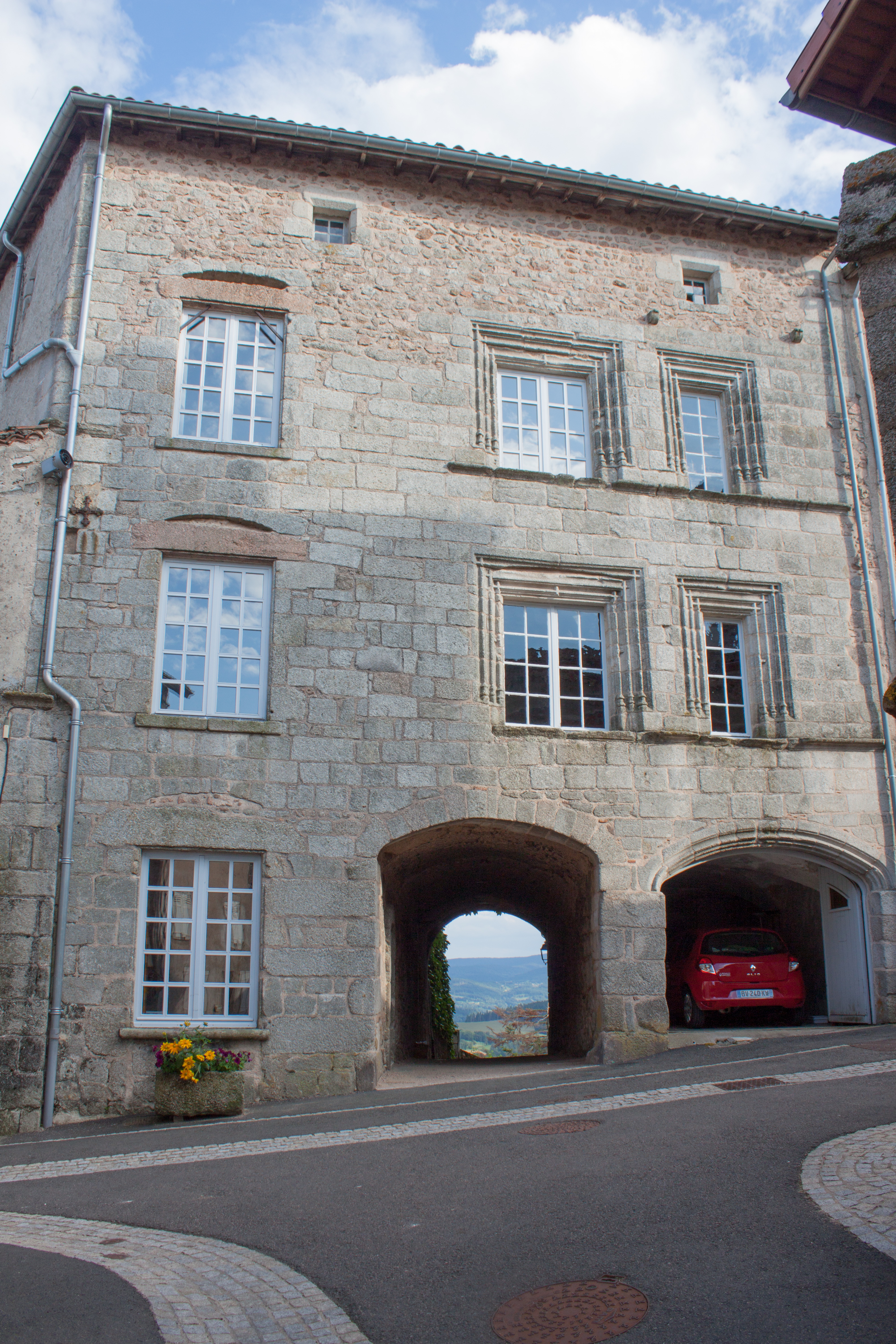 Audotorium de Cervières